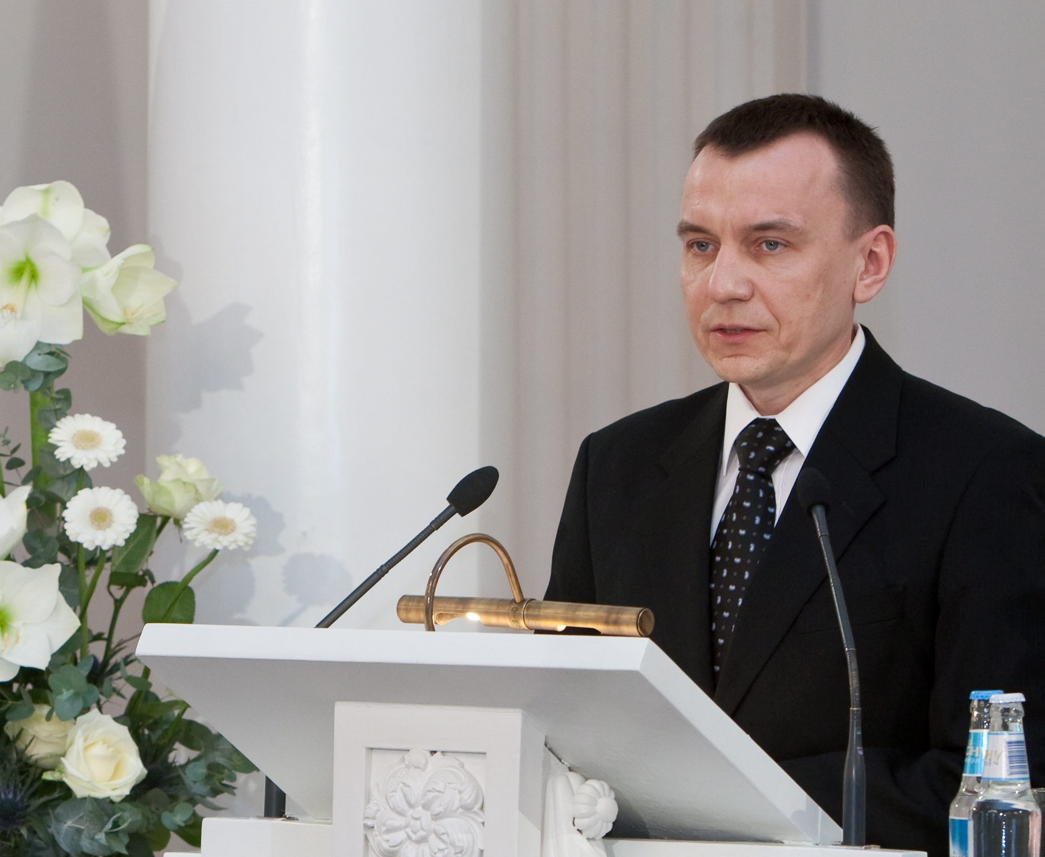 Eesti Vabariigi 92. aastapäevale pühendatud kontsertaktus 23. veebruaril 2010 Tartu Ülikooli aulas. Pildil Tartu Ülikooli arstiteaduskonna teadusprodekaan, füsioloogilise genoomika professor Sulev Kõks esinemas ettekandega "Meie vaimu pärilikkusest".